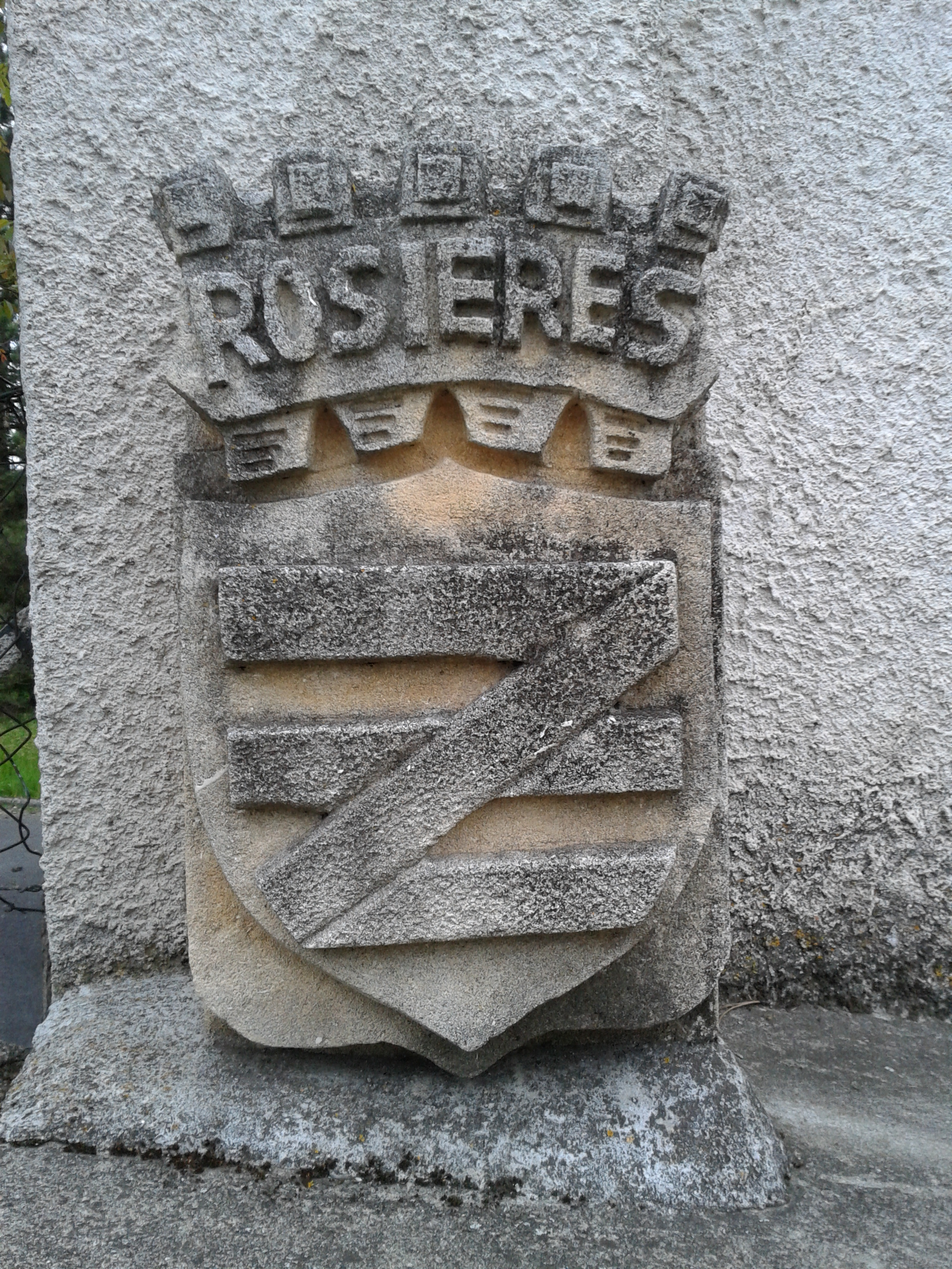 Le logo de Rosières (43) taillé sur un mur du village.